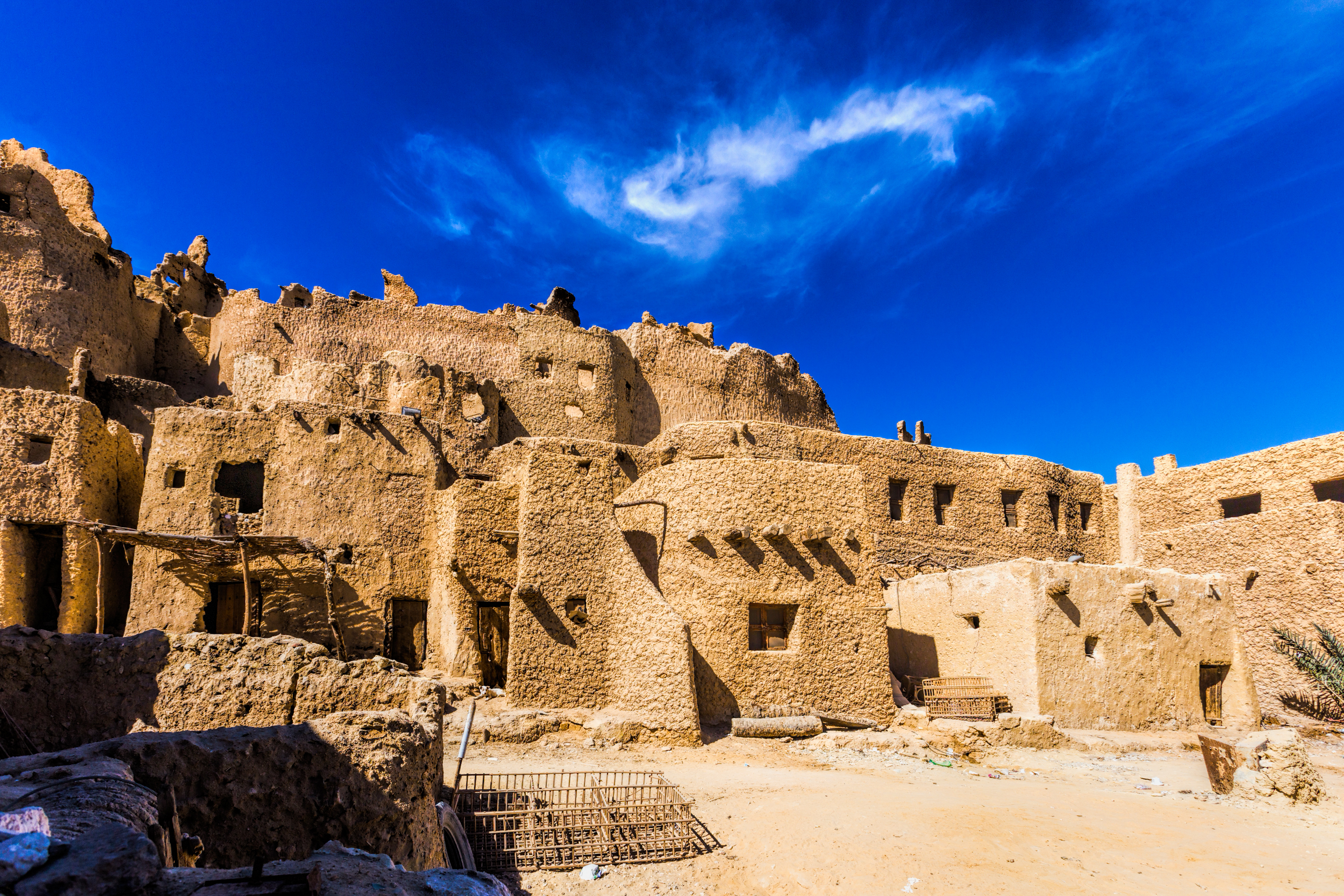 المدينه القديمة شالى سيوة